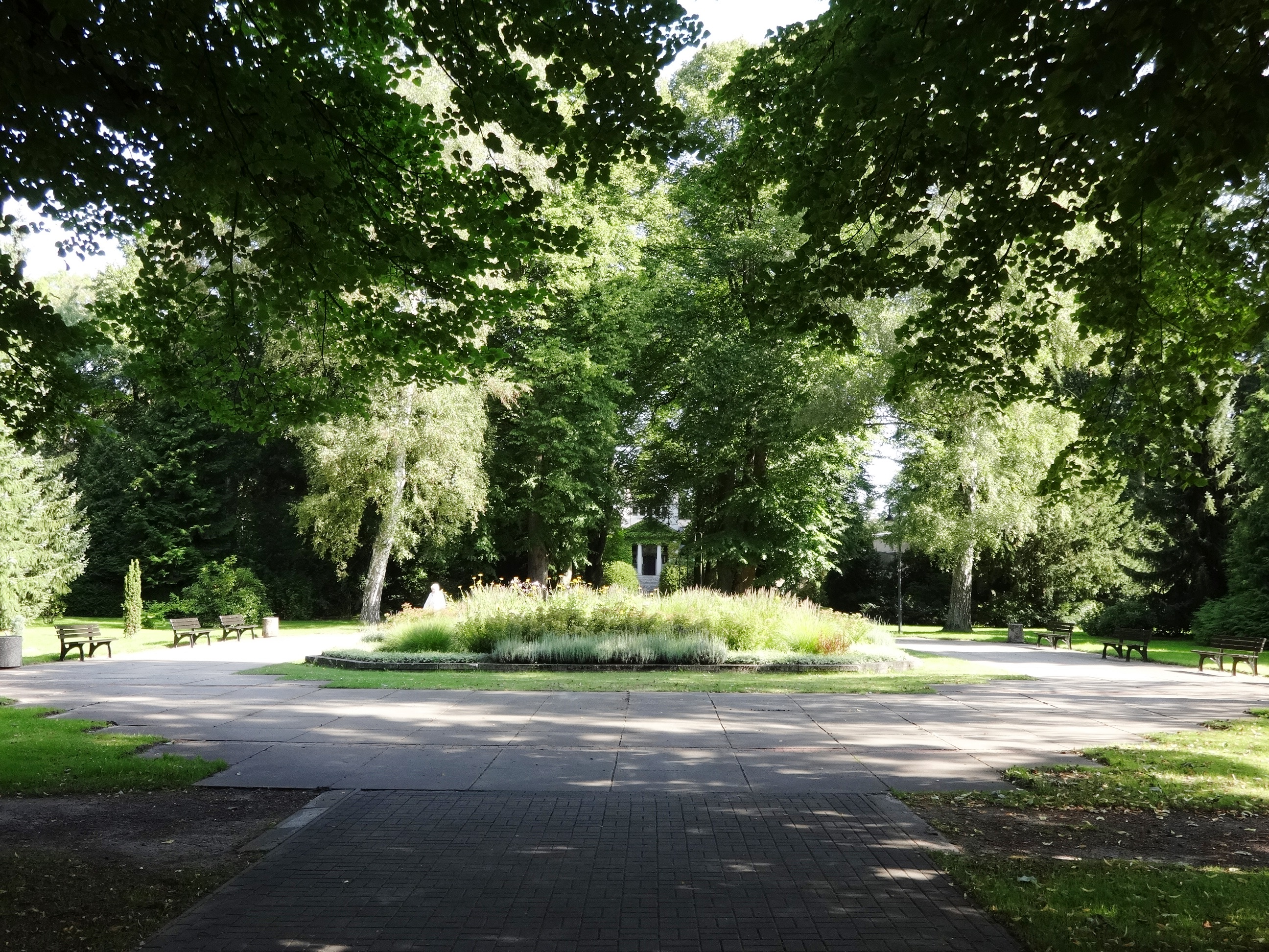 Neuer Friedhof im Nordwesten von Greifswald mit Trauerhalle, Krematorium und Sowjetischem Ehrengrab in Mecklenburg-Vorpommern